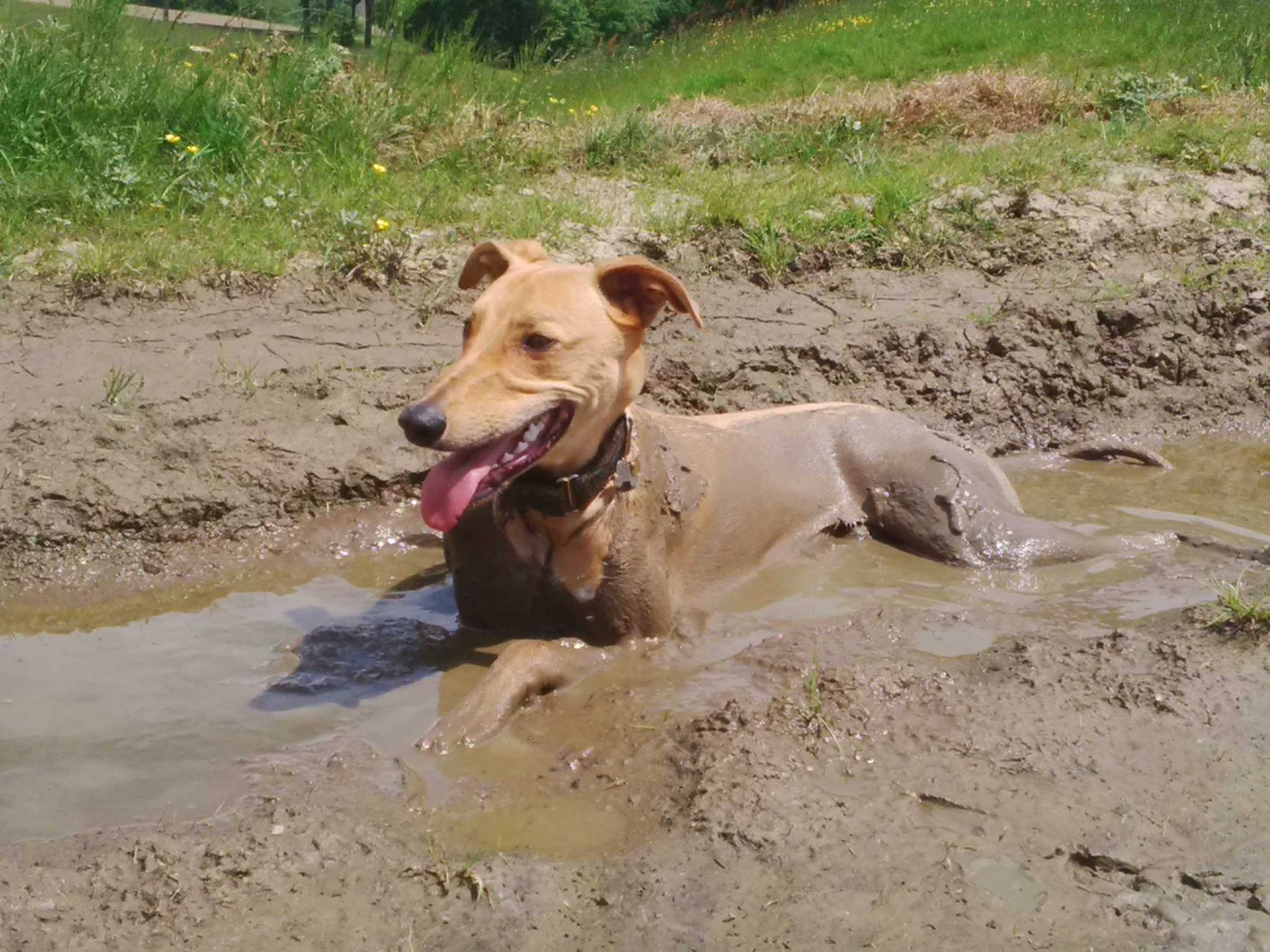 Lévrier hongrois qui barbote dans une flasque d'eau par forte chaleur